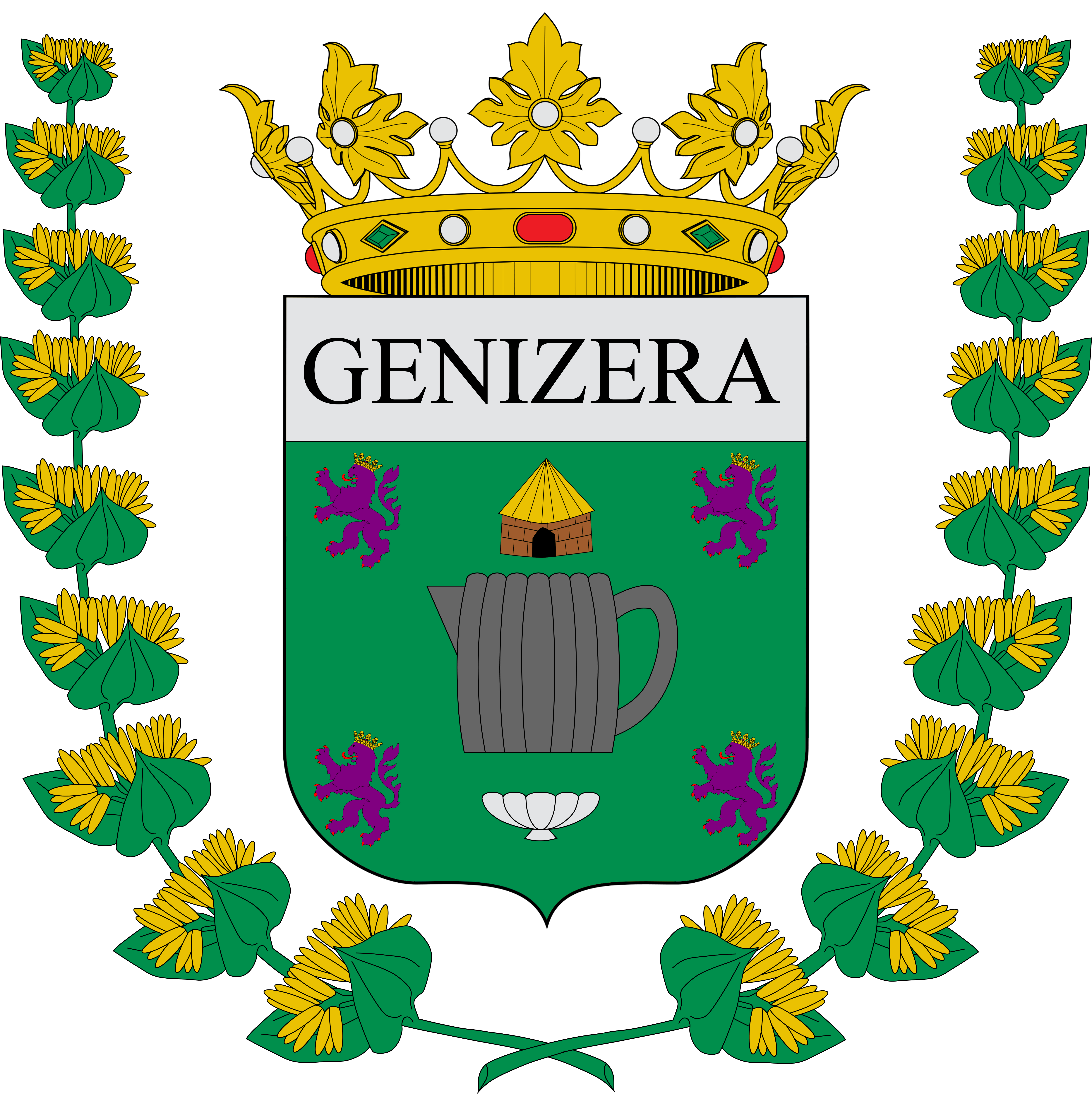 Escudo de Genicera